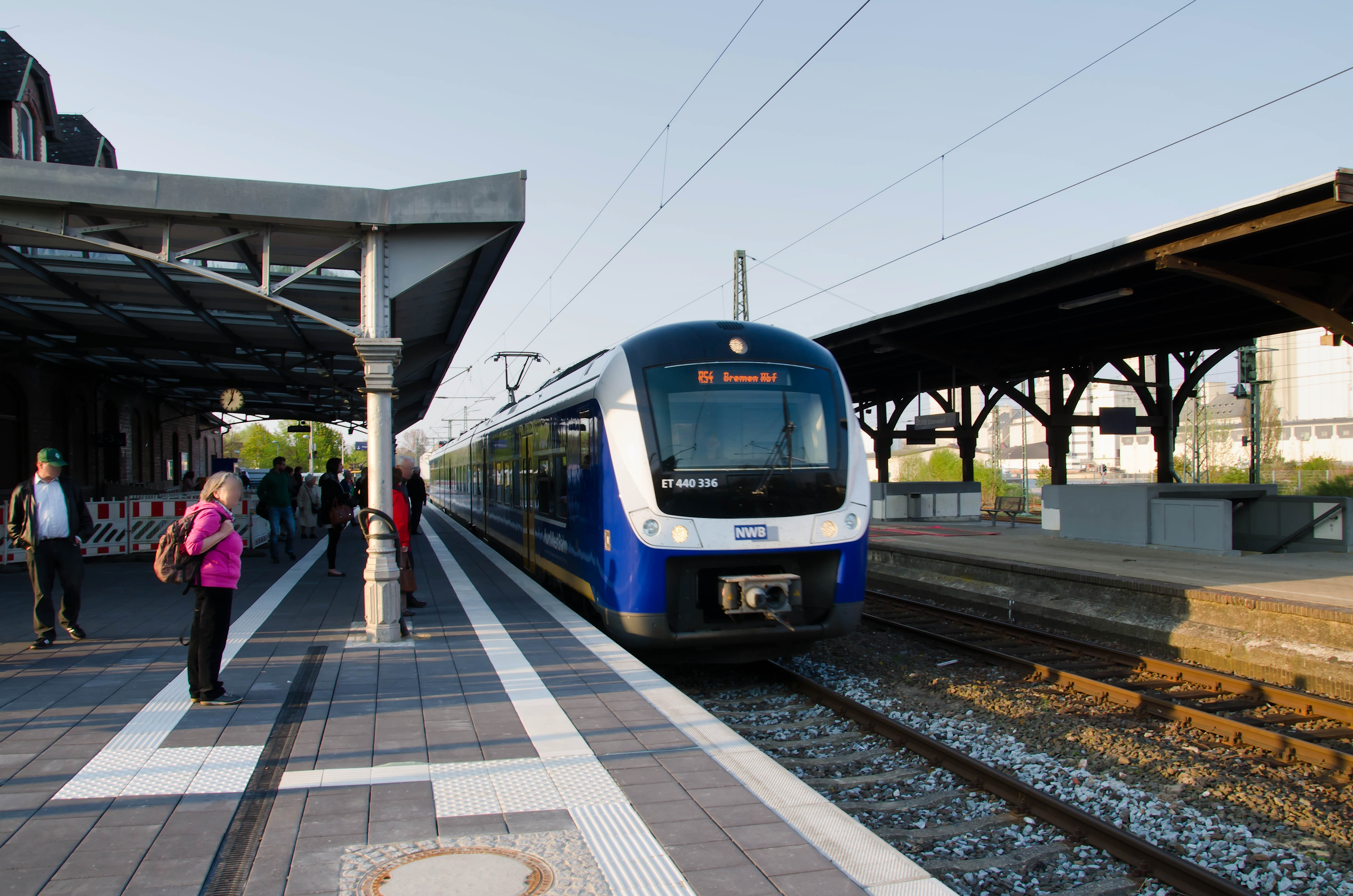 Bahnhof Brake in Brake, Niedersachsen (Deutschland), mit Coradia Continental der NordWestBahn auf der Linie RS 4 der Regio-S-Bahn Bremen/Niedersachsen (hier in Fahrtrichtung Bremen Hbf auf der Strecke Bremen Hbf–Nordenham).